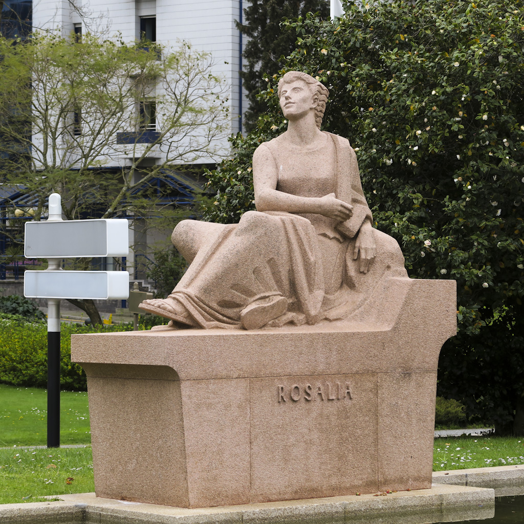 Barata Feyo, Monumento Rosalia de Castro, Porto